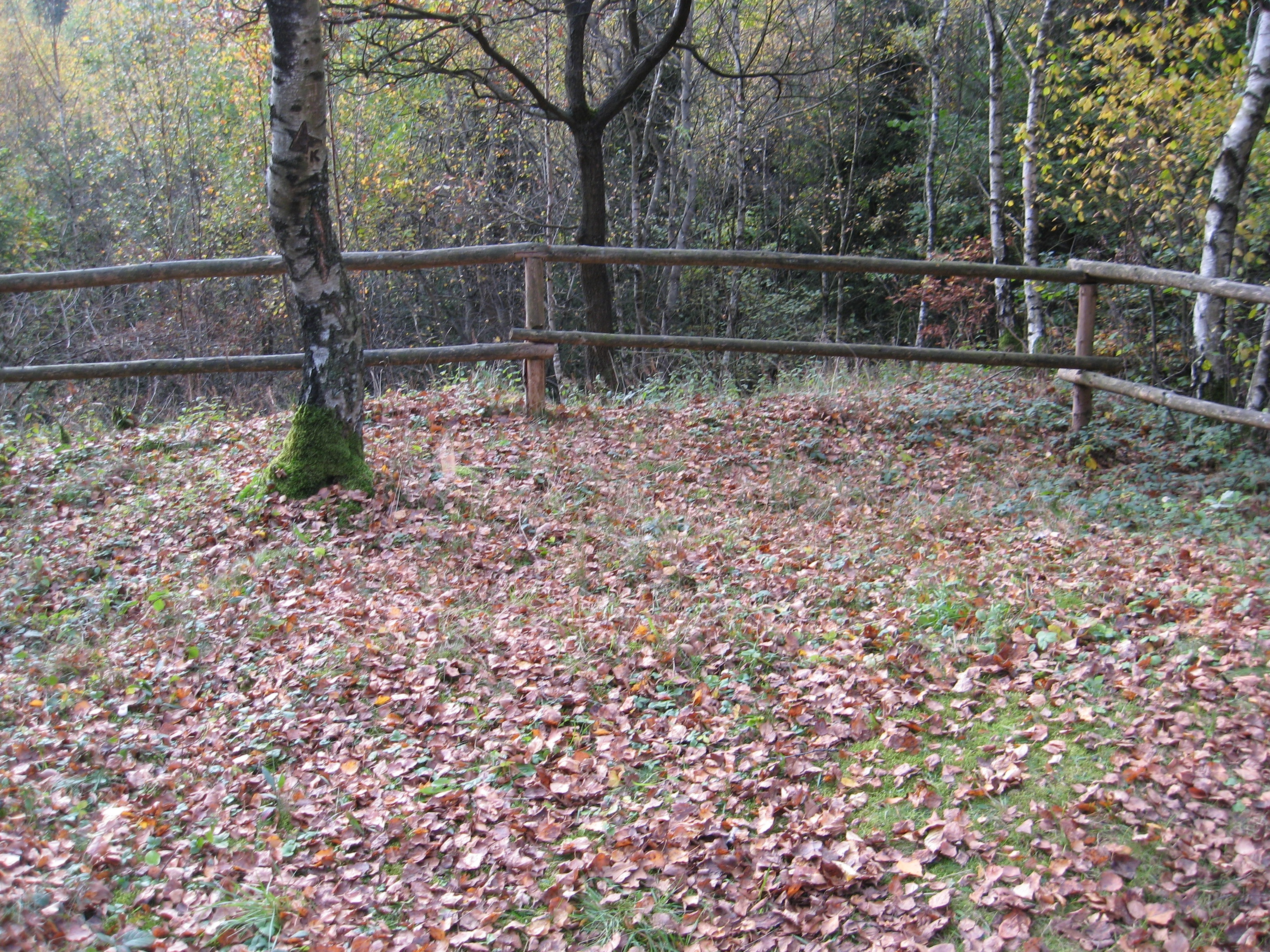 Halde der Grube Morgenröte bei Wilden (Wilnsdorf), Siegerland.